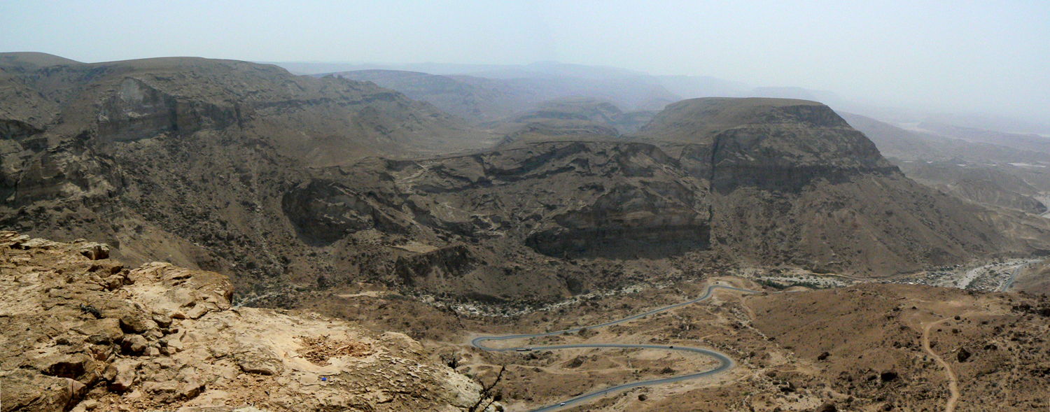 graben lié au rifting du Golfe d'Aden (Nord de Mukalla)